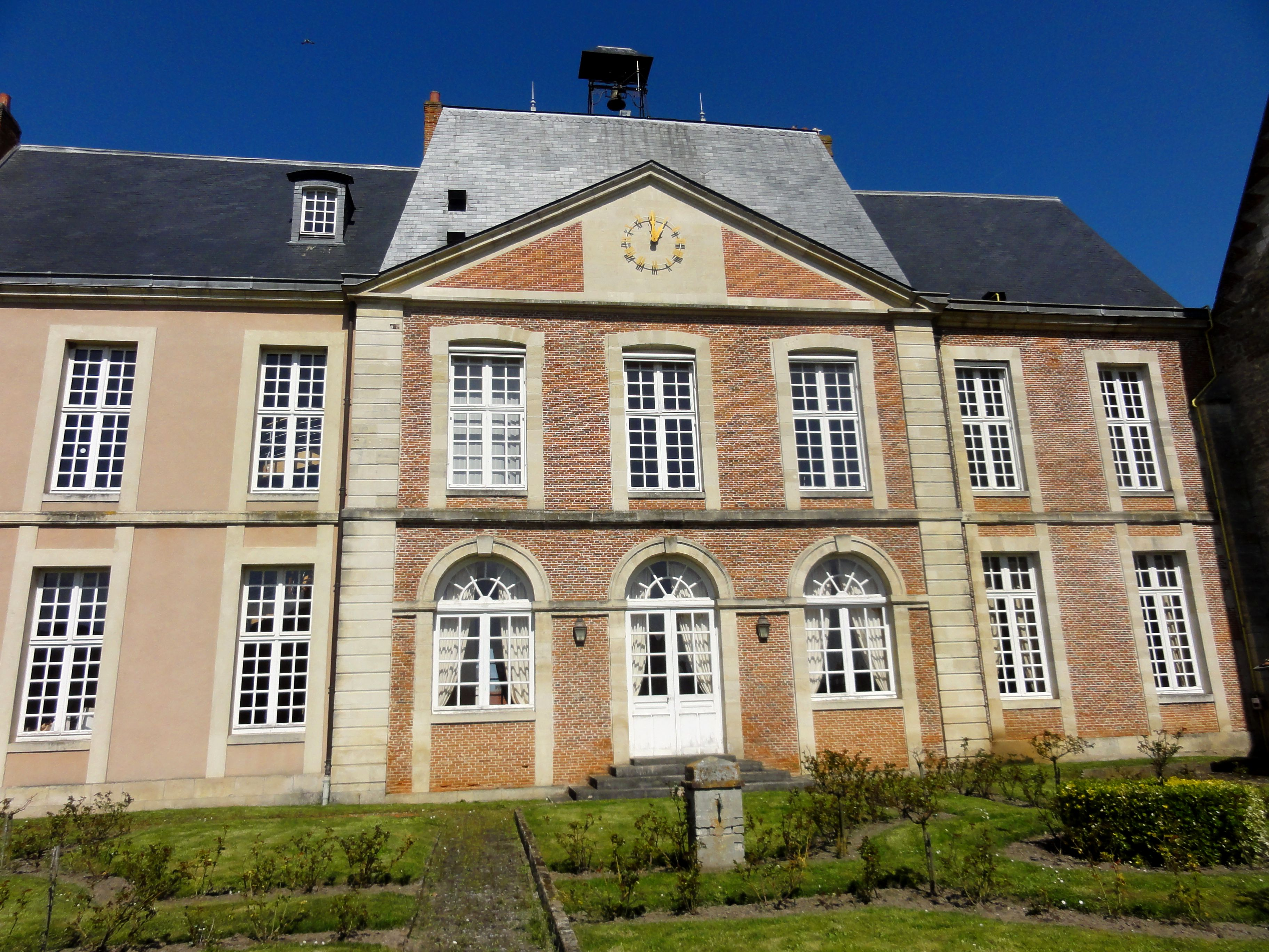 Façade sud.